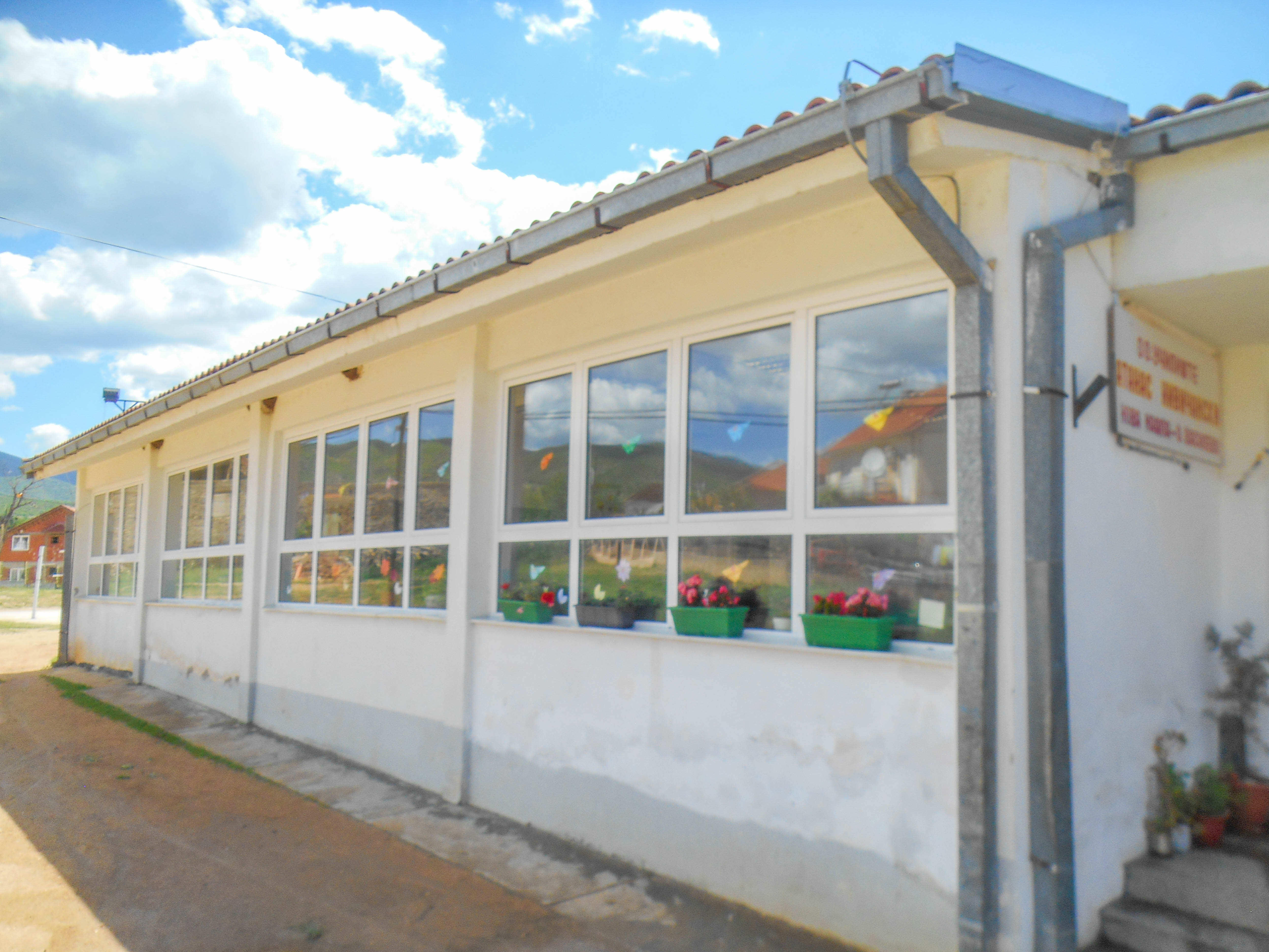 Основно училиште „Атанас Нивичански“ - Нова Маала